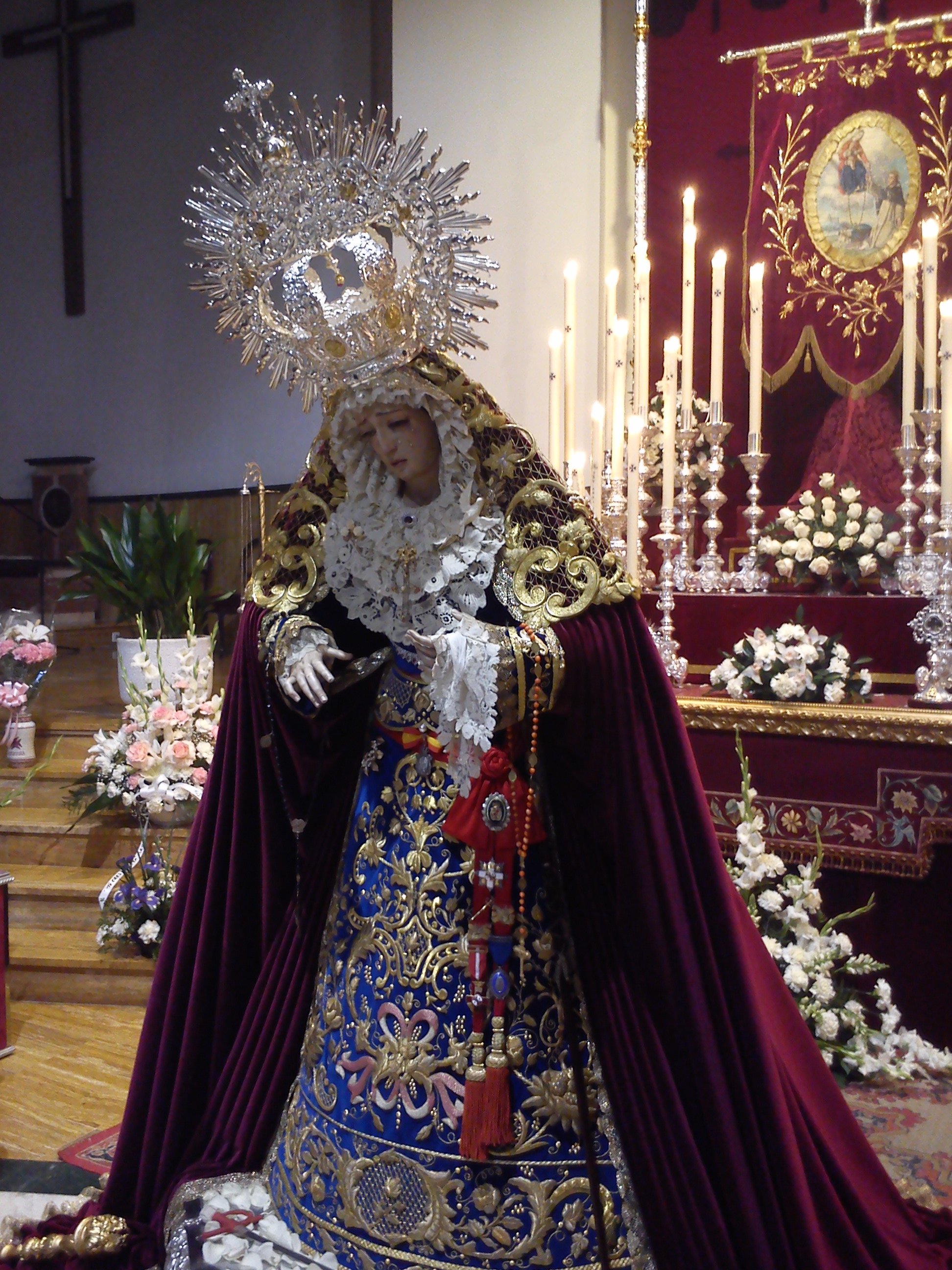 Virgen de la Amargura de Jaén.